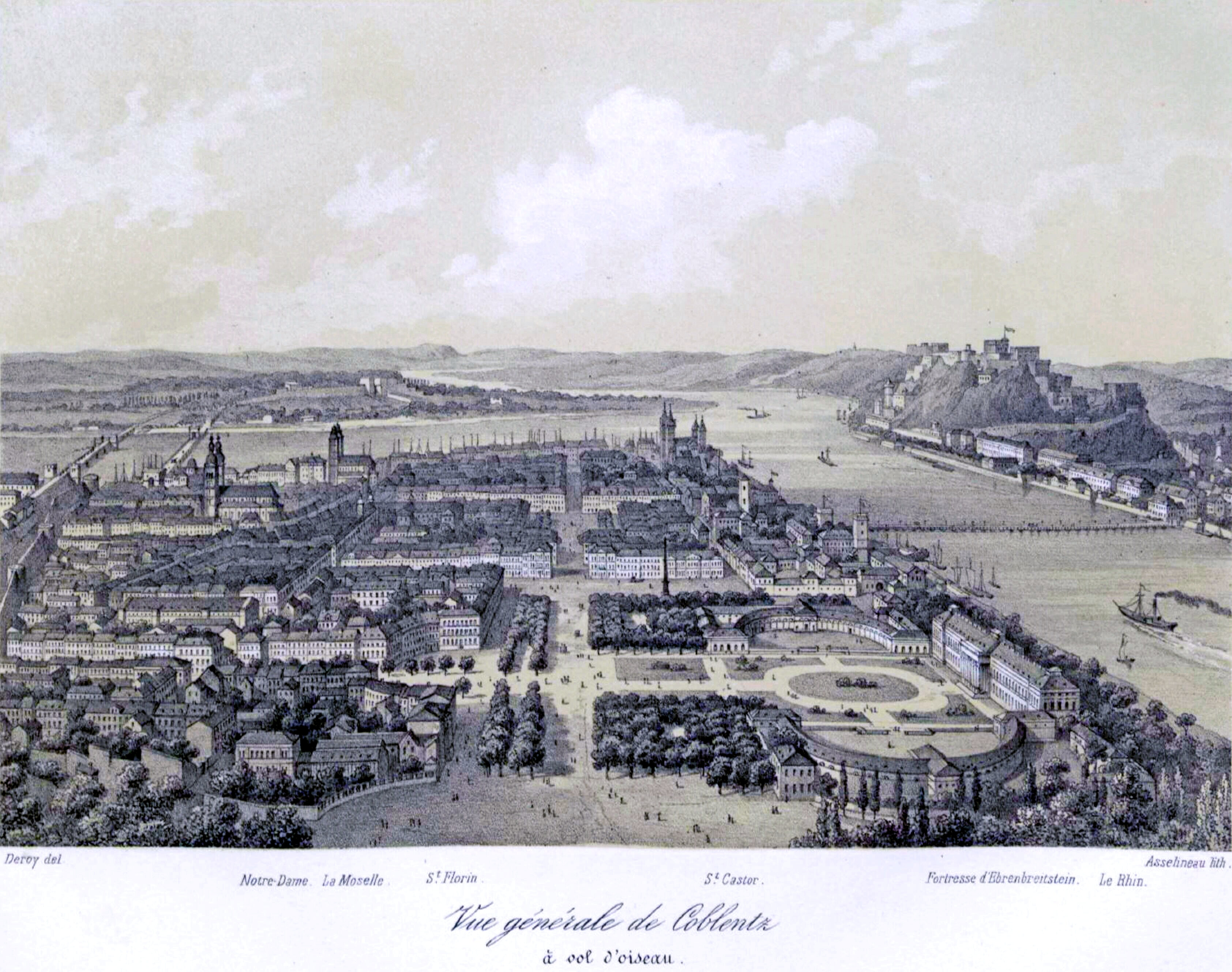 Koblenz aus der Vogelperspektive